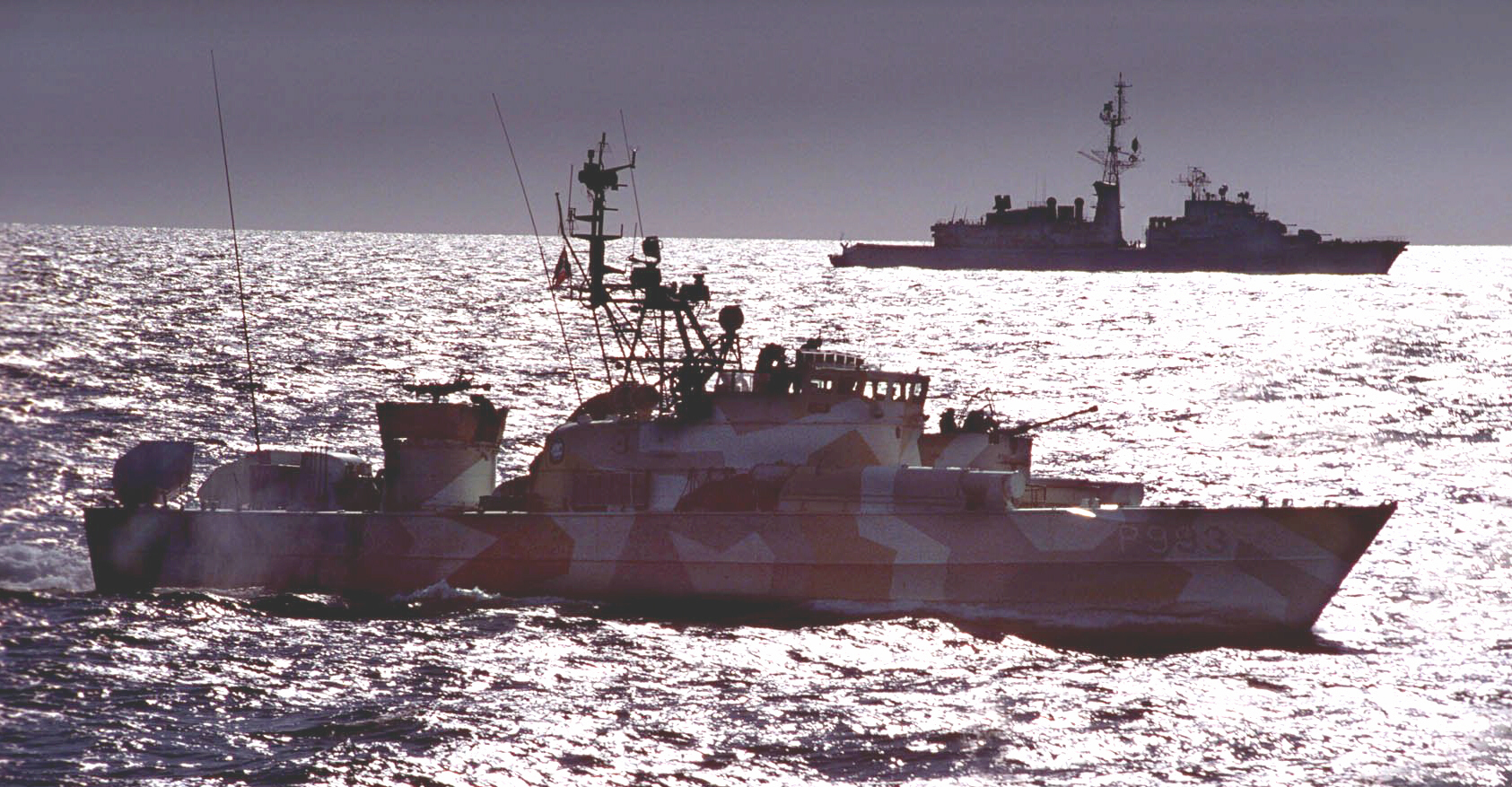 Bearbeitung des in Public Domain stehenden Fotos [1] von User:Inge HNoMS Lom in Tropentarnung auf Patrouille in der Gibraltar-Meerenge im Rahmen des "War on terror". Privatphoto.